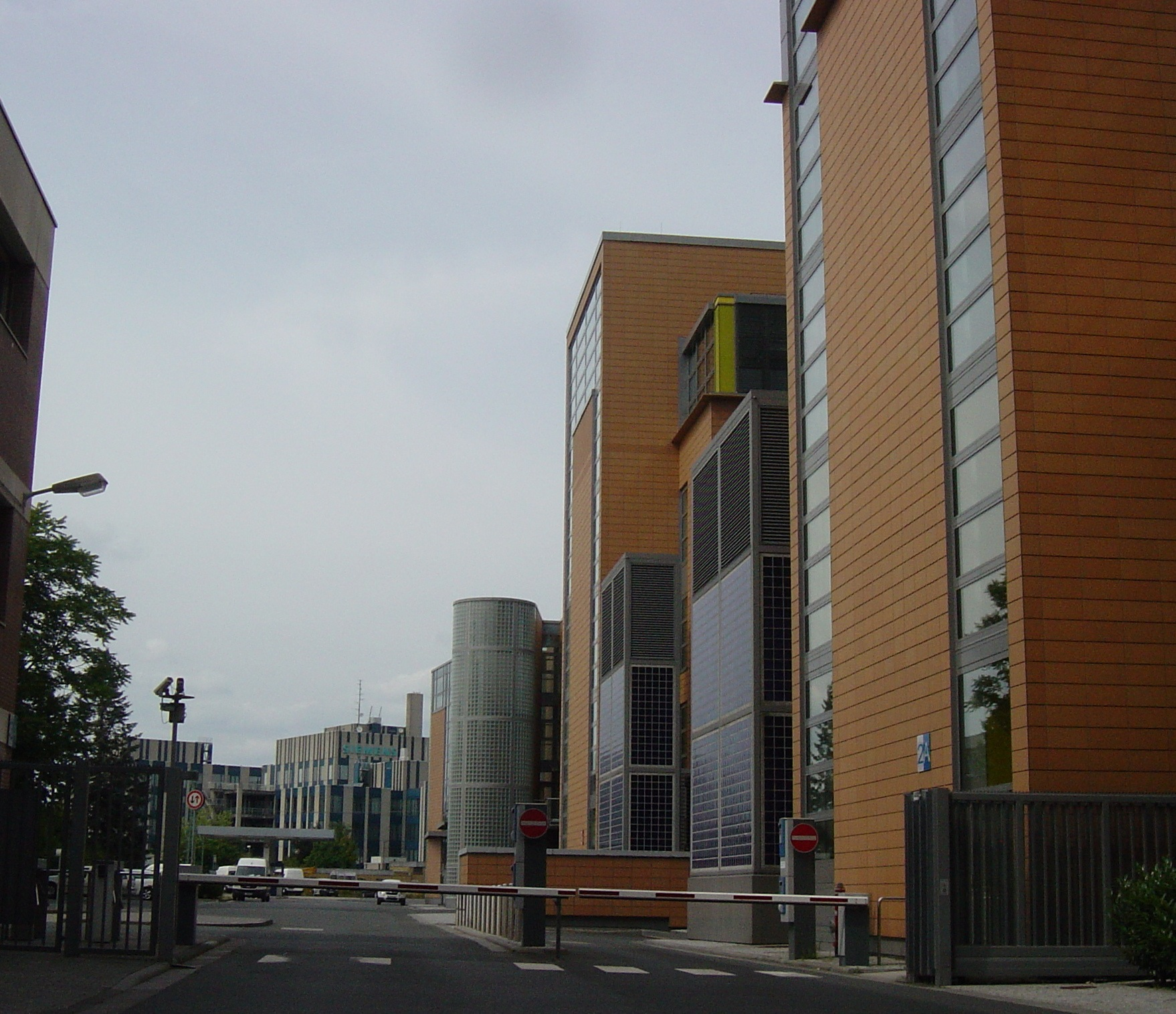 Frankfurt Bockenheim, Solmsstraße, Mainova AG, Einfahrt Betriebsgelände; hinter den Bahngleisen im Hintergrund Firma Siemens. 1878 gründeten hier, in der Solmsstraße 31, die Brüder Ernst und Rudolph Schmidt eine Druckfarbenfabrik, die später als Gebr. Schmidt Druckfarben-Fabriken nach Rödelheim verlegt wurde und heute der FLINT GROUP gehört.